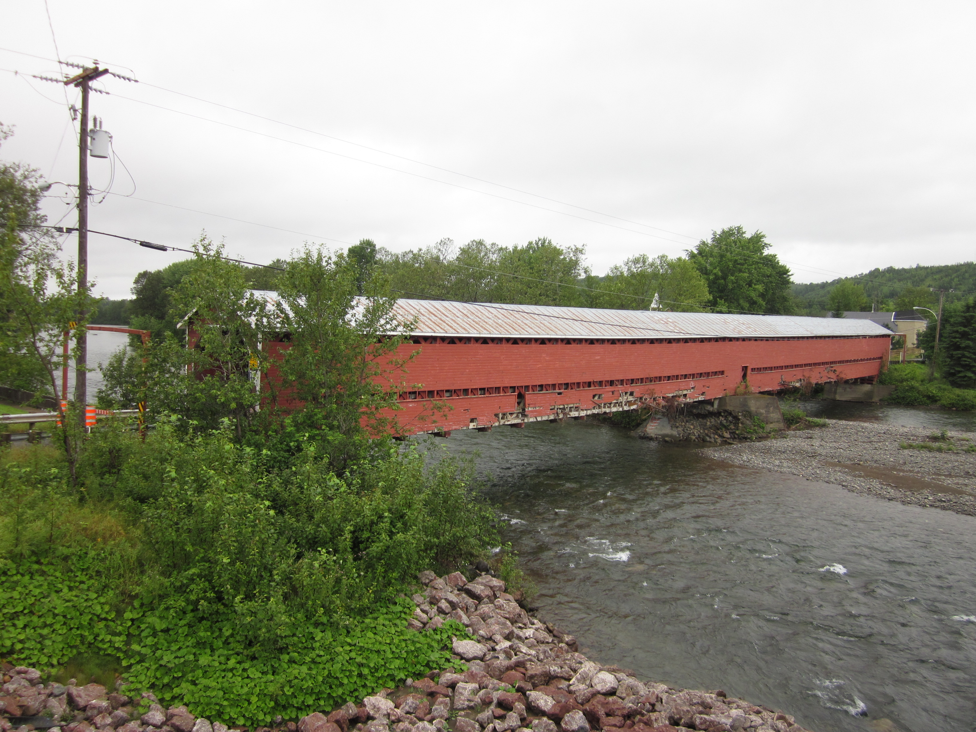 Pont de Saint-Edgar en 2011